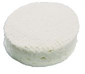 Fromage de vache fabriqué en Bourgogne